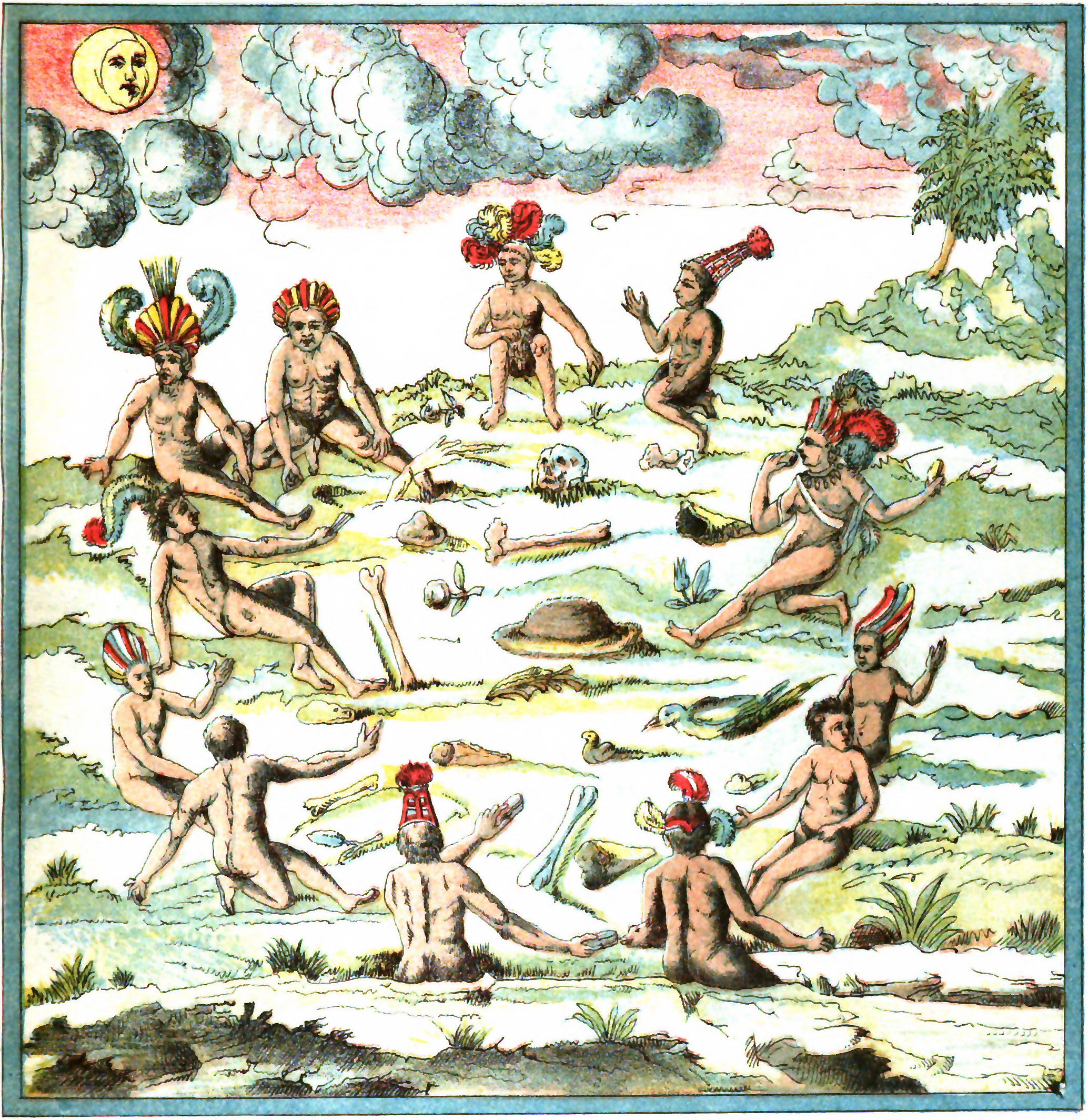 Moeurs des Indiens tel que décrites par Champlain dans ses mémoires de voyage dans le golfe du Mexique. «Apres qu'ils ont bien chanté & dansé, ils se mettent le visage en terre, & tout à vng coup tous ensemble commencent à crier & pleurer en disant : O puissante & claire lune, fay que nous puissions vaincre nos ennemis, & que les puiíìlons manger, à celle fin que ne tombions entre leurs mains, & que mourans nous puissions aller auec nos parents nous reílouir.» Tiré du BRIEF DISCOVRS DES CHOSES PLVS REMARQVABLES QVE SAMMVEL CHAMPLAIN DE BROVAGE A reconneues aux Indes Occidentalles Au voiage qu'il en a faict en icelles en l'année 1599 et en l'année 1601.